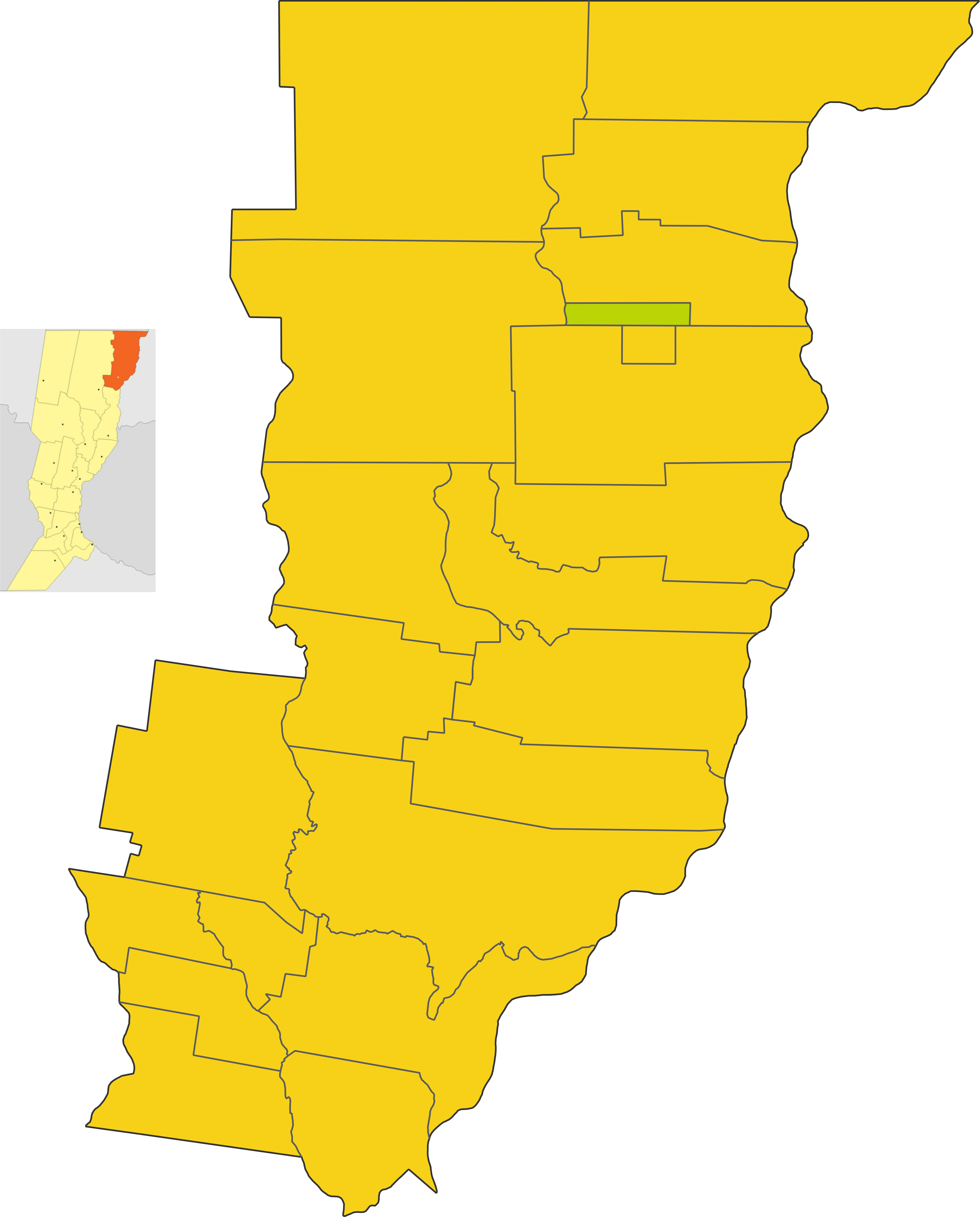 Map of the comuna de San Antonio de Obligado in General Obligado department, Santa fe province, Argentina